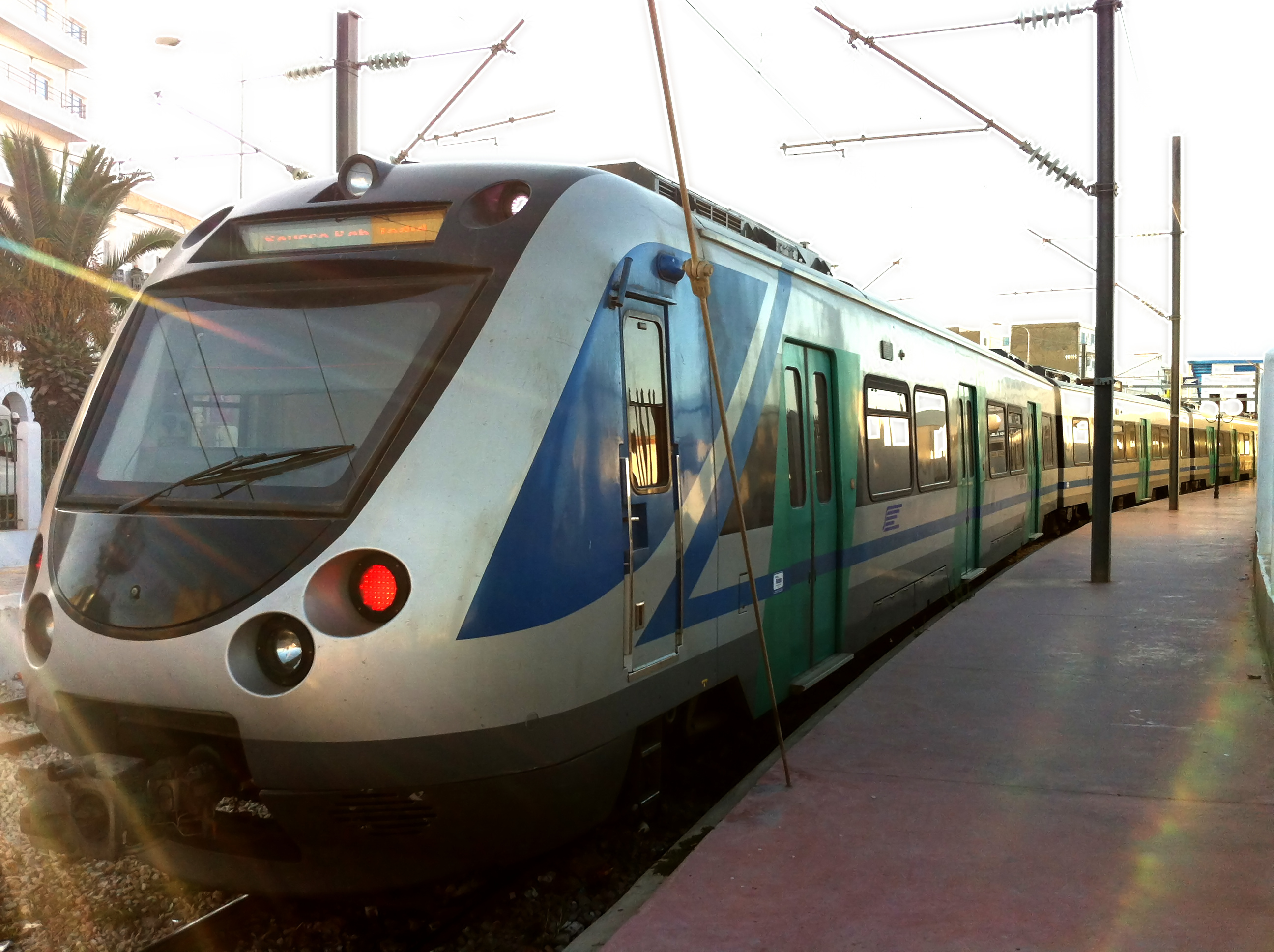 Train électrique du Métro du Sahel, assurant le trajet Sousse-Monastir-Mahdia. Tunisie